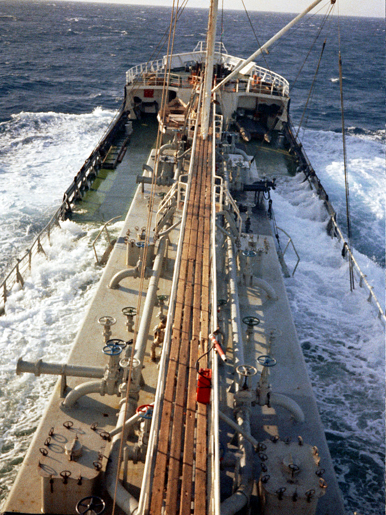 המיכלית סירניה עושה את דרכה במפרץ סואץ, נובמבר 1972